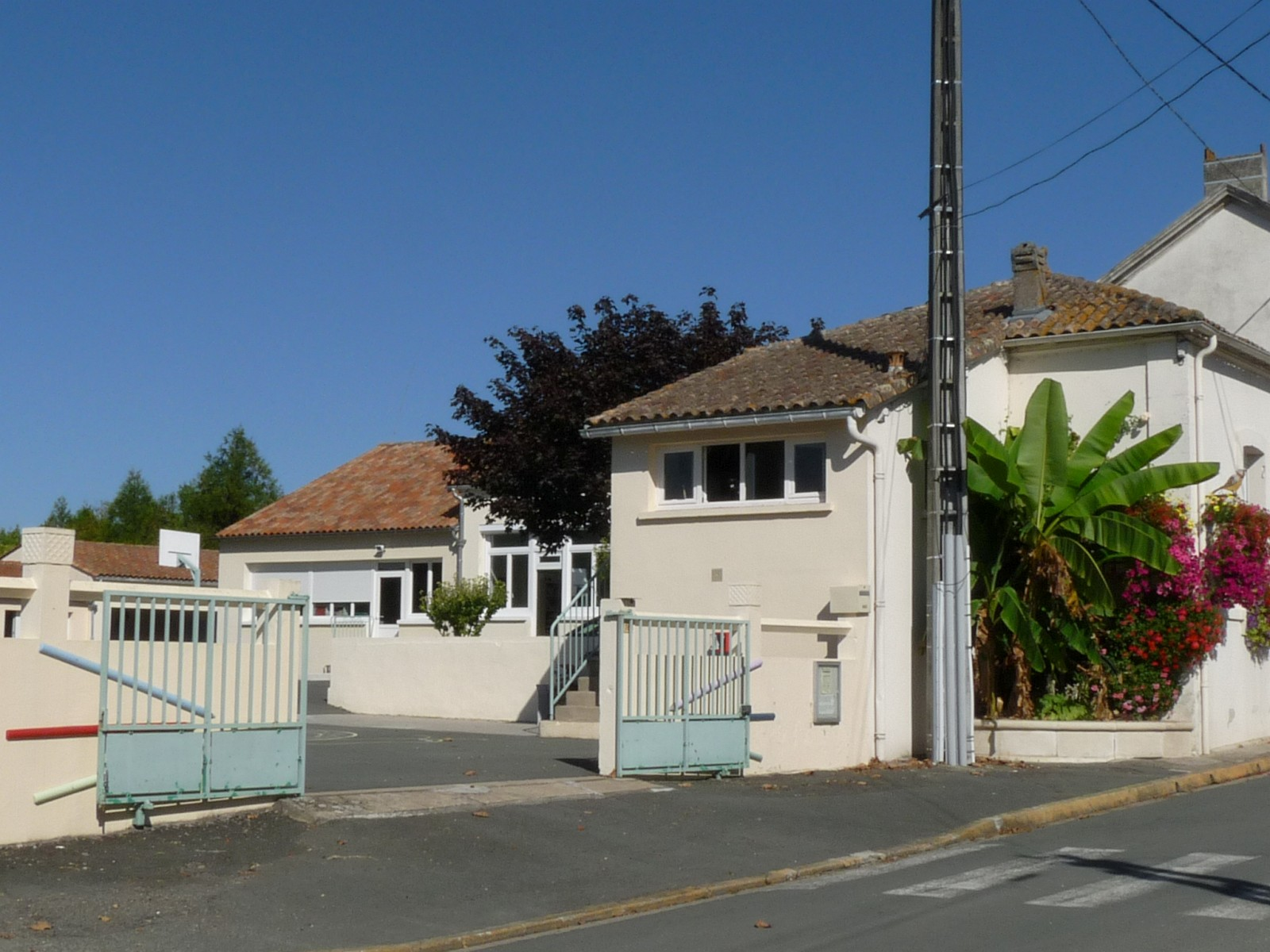 Ecole, Arthenac, Charente-Maritime, France